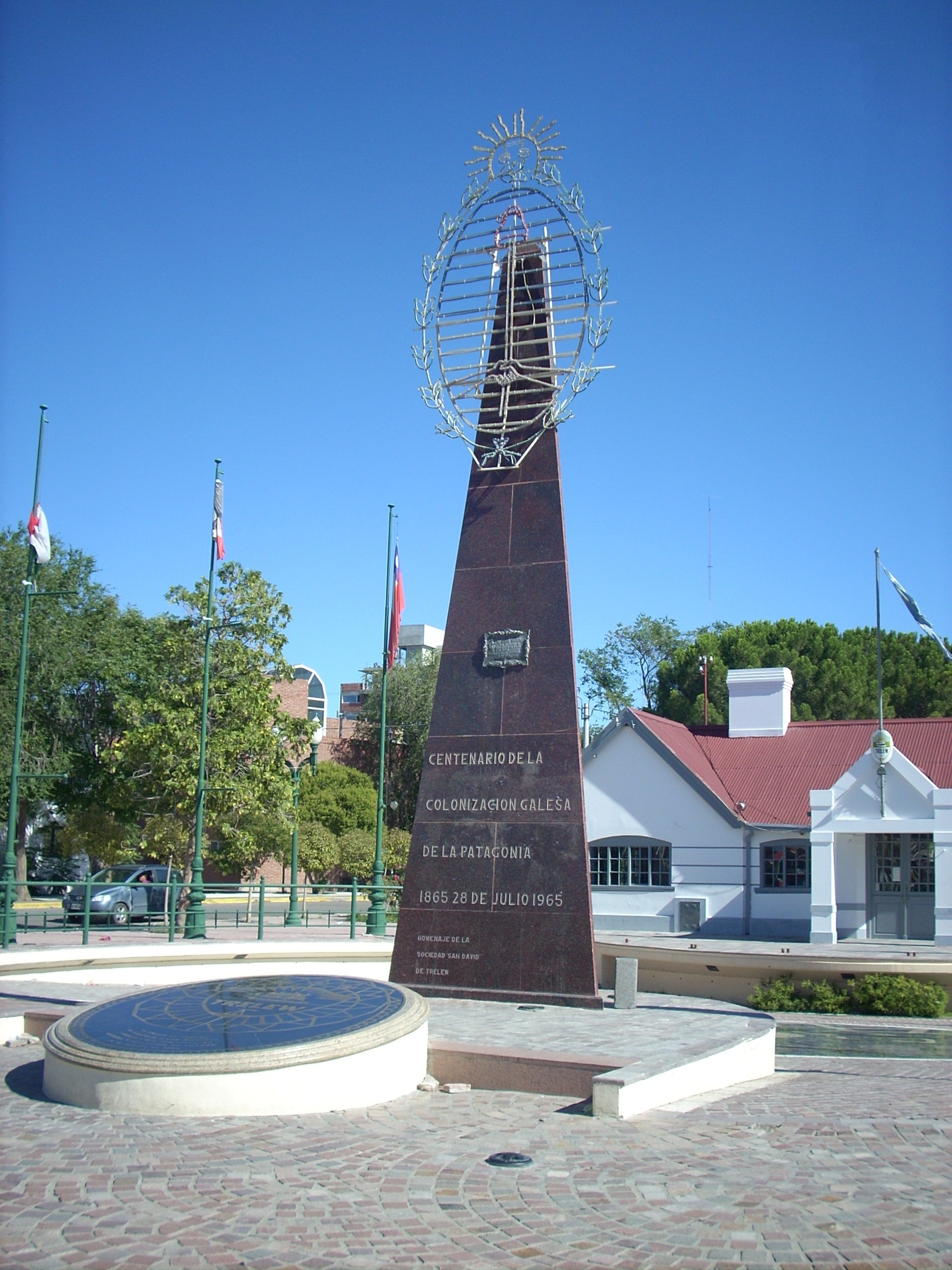 Monuemento del Centenario de la Colonia Galesa (texto en español). La imagen está retocada.